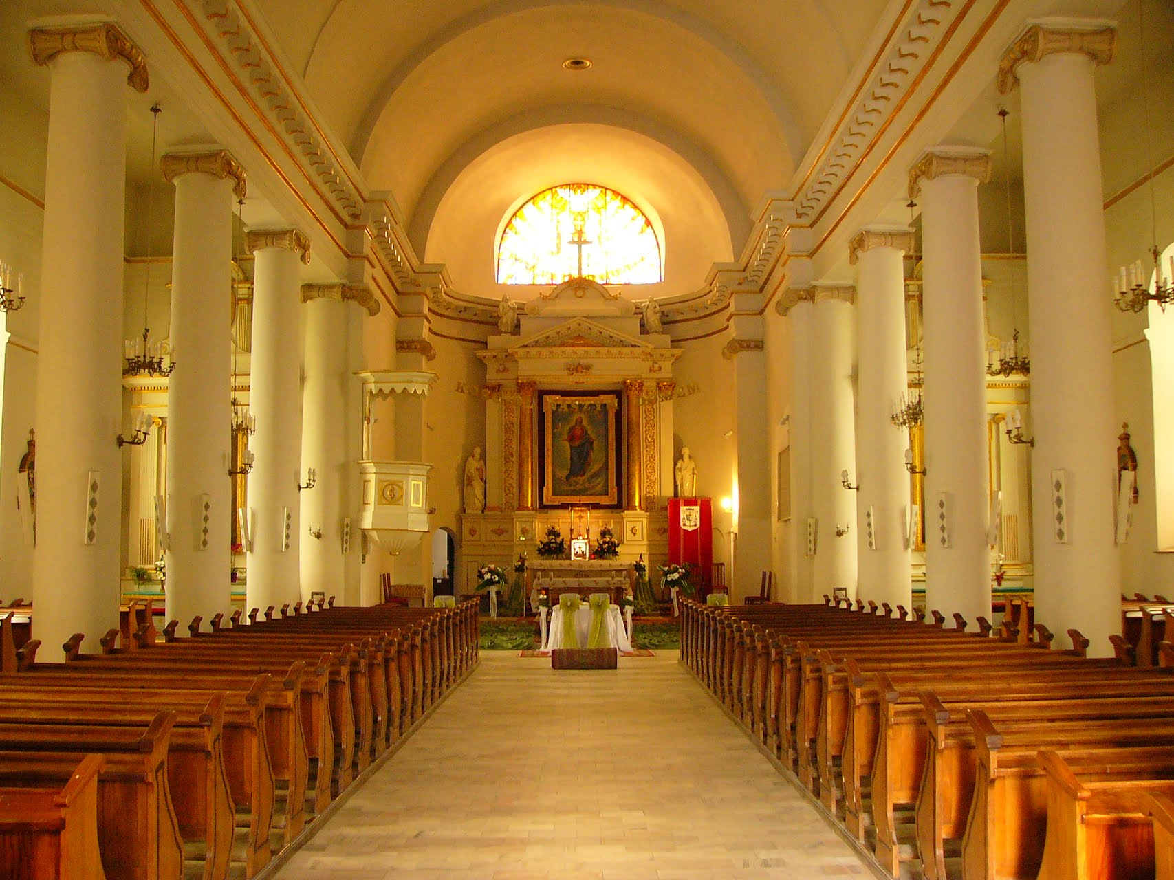 Suwałki, ul. Emilii Plater 2,, Kościół p.w. św. Aleksandra (zabytek nr 58 z 11.04.1956)